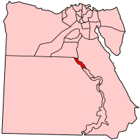 Antiguo mapa de la gobernatura de Asiut Map of Egypt showing Asyut governorate. Made by User:Golbez based on PD maps.